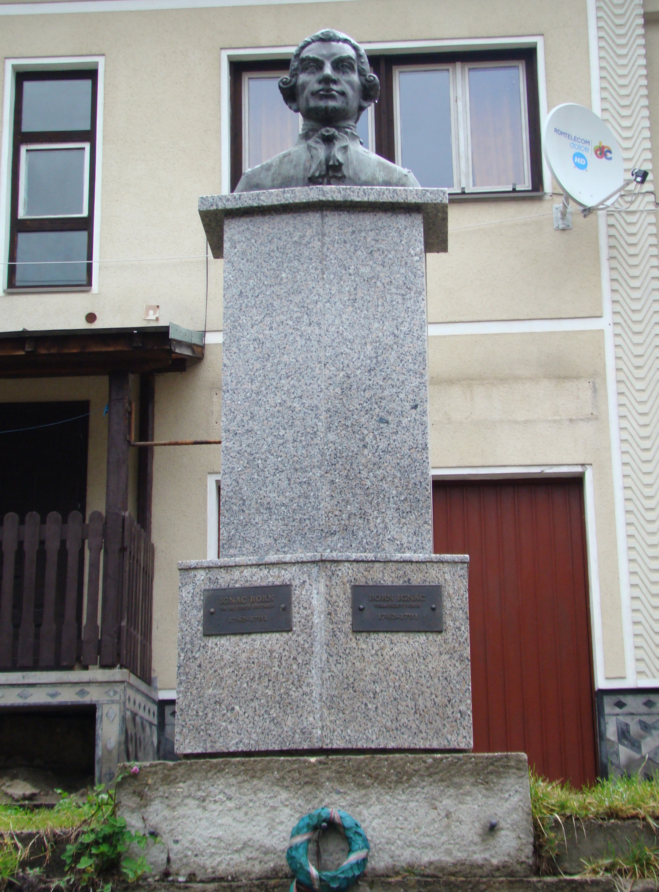 Bustul lui Ignațiu von Born din Cavnic (în fața Muzeului Born si Papp)